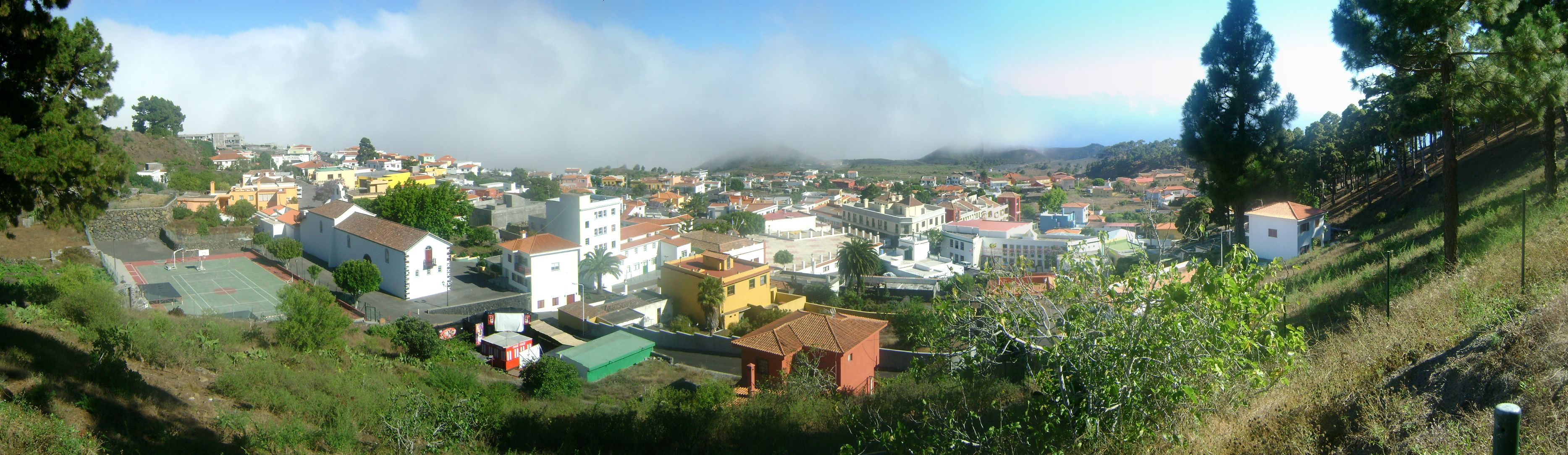 Panóramica de Fuencaliente